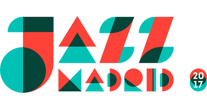 Madrid en noviembre suena a todo jazz. La gran cita musical del otoño madrileño celebrará su nueva edición del 2 al 30 de noviembre, ampliando su programación con más de un centenar de actuaciones que inundarán la ciudad de todas las estéticas del jazz, así como diferentes actividades paralelas en las que se desarrollarán debates, exposiciones, proyecciones cinematográficas, conferencias o literatura.